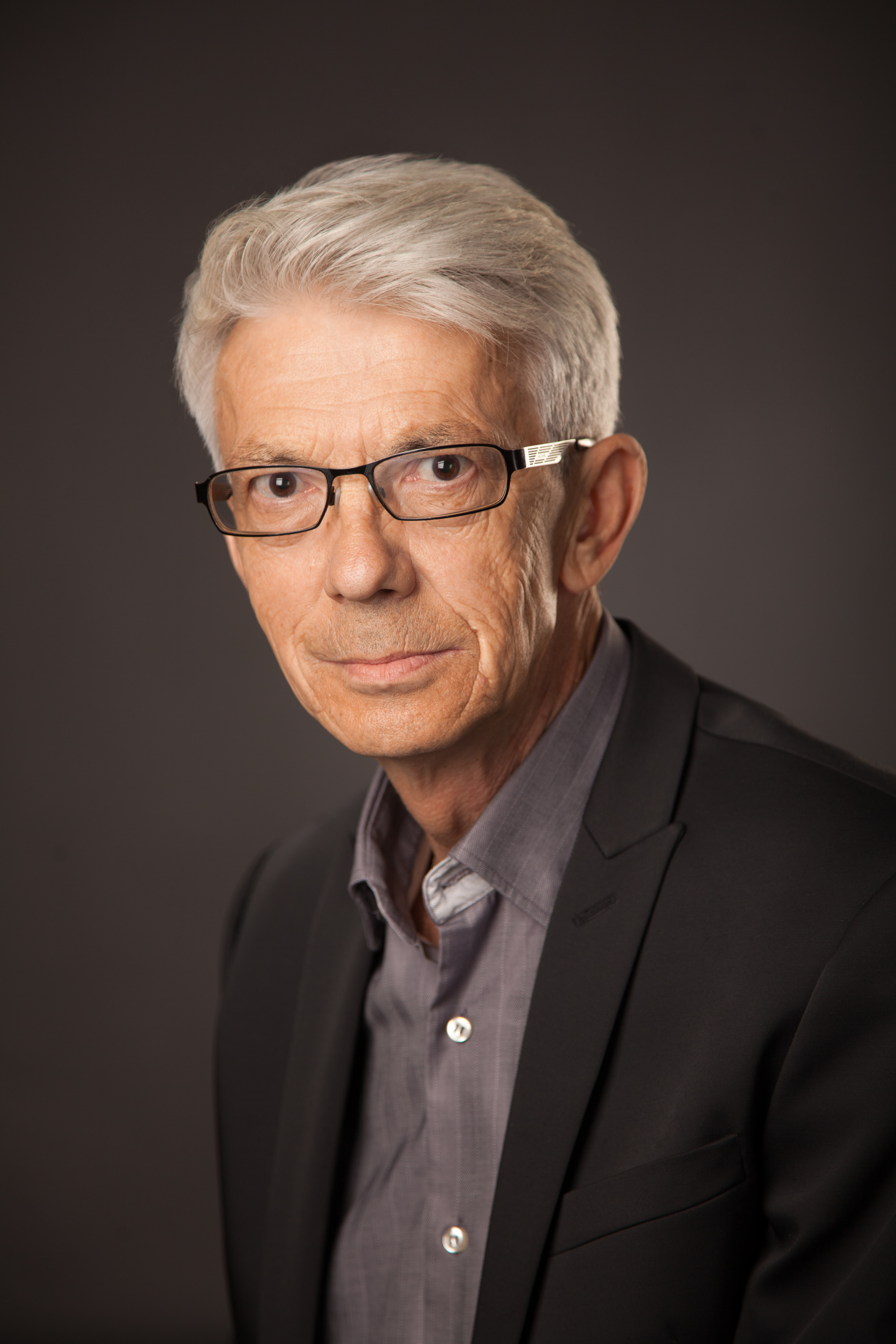 Портрет